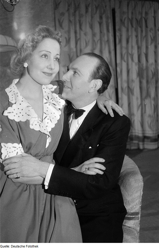 Original image description from the Deutsche Fotothek Szenenbilder